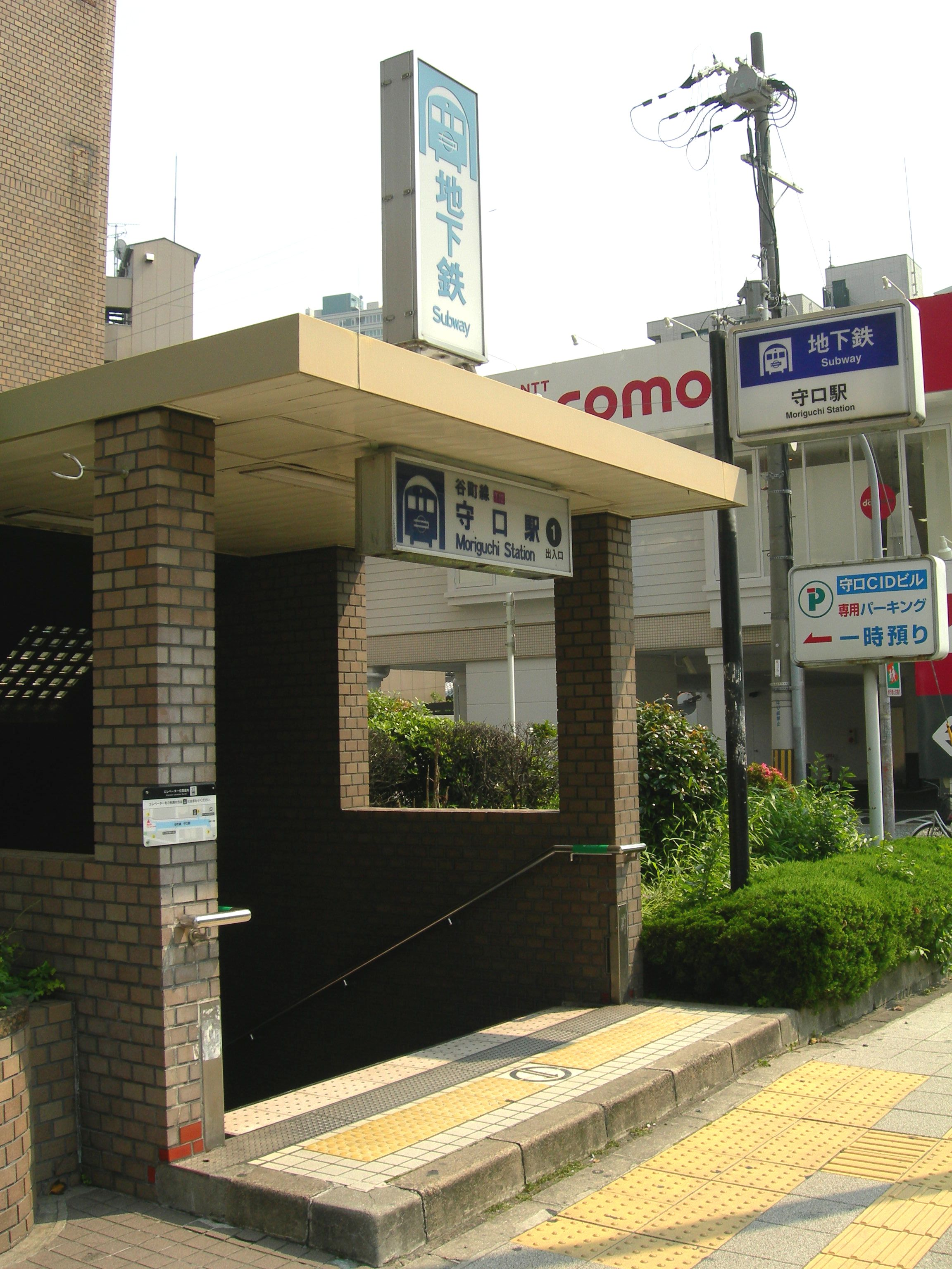 大阪市営地下鉄守口駅